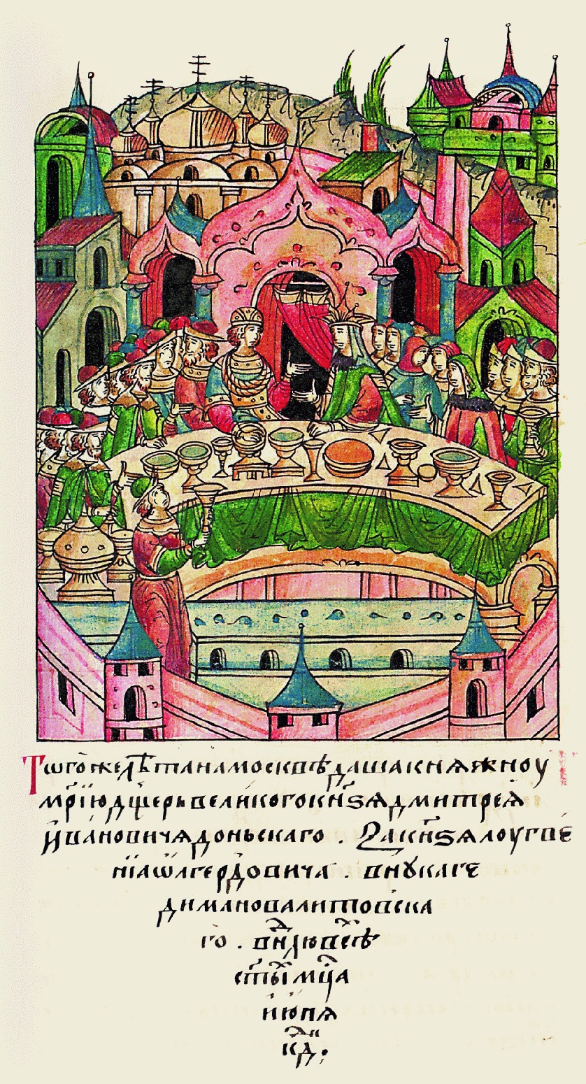 В том же году в Москве отдали дочь великого князя Дмитрия Ива- новича Донского за князя Лугвена Ольгер- довича, внука Гедими- на Литовского, в неде- лю Всех святых месяца июня в 24 день.